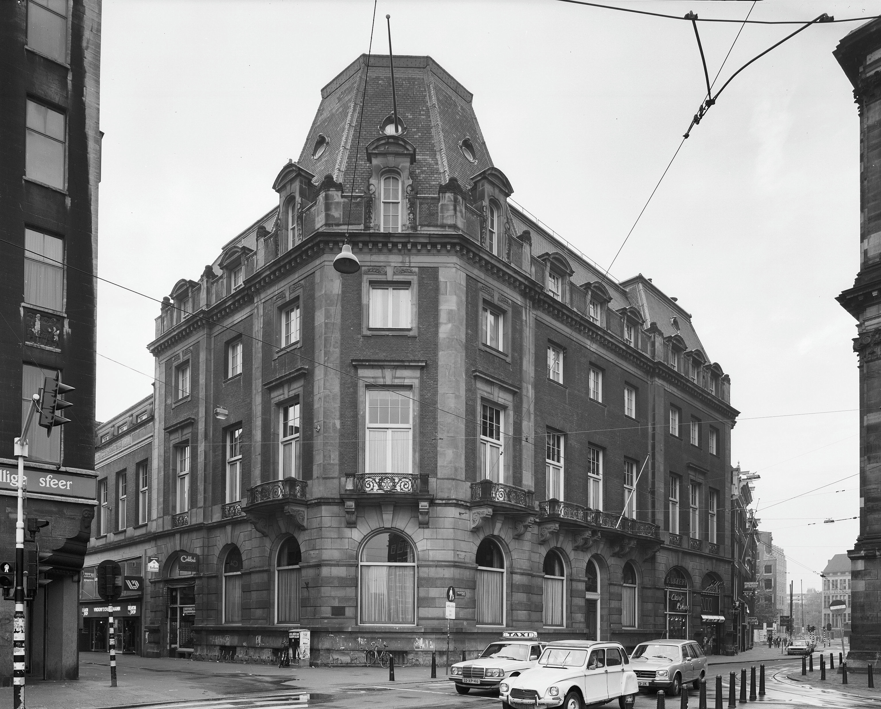 voorzijde